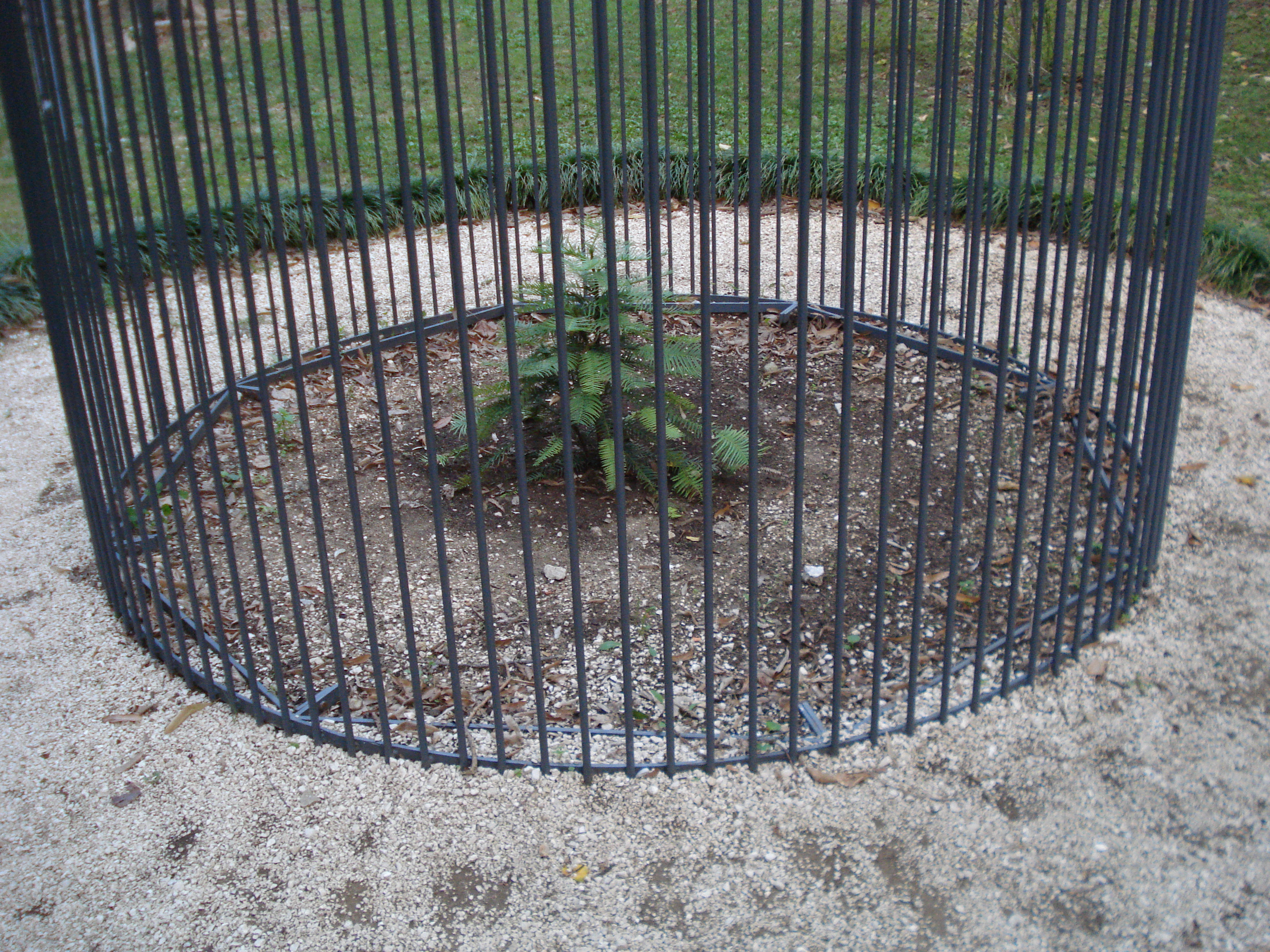 Australski stribor u Perivoju Vladimira Nazora